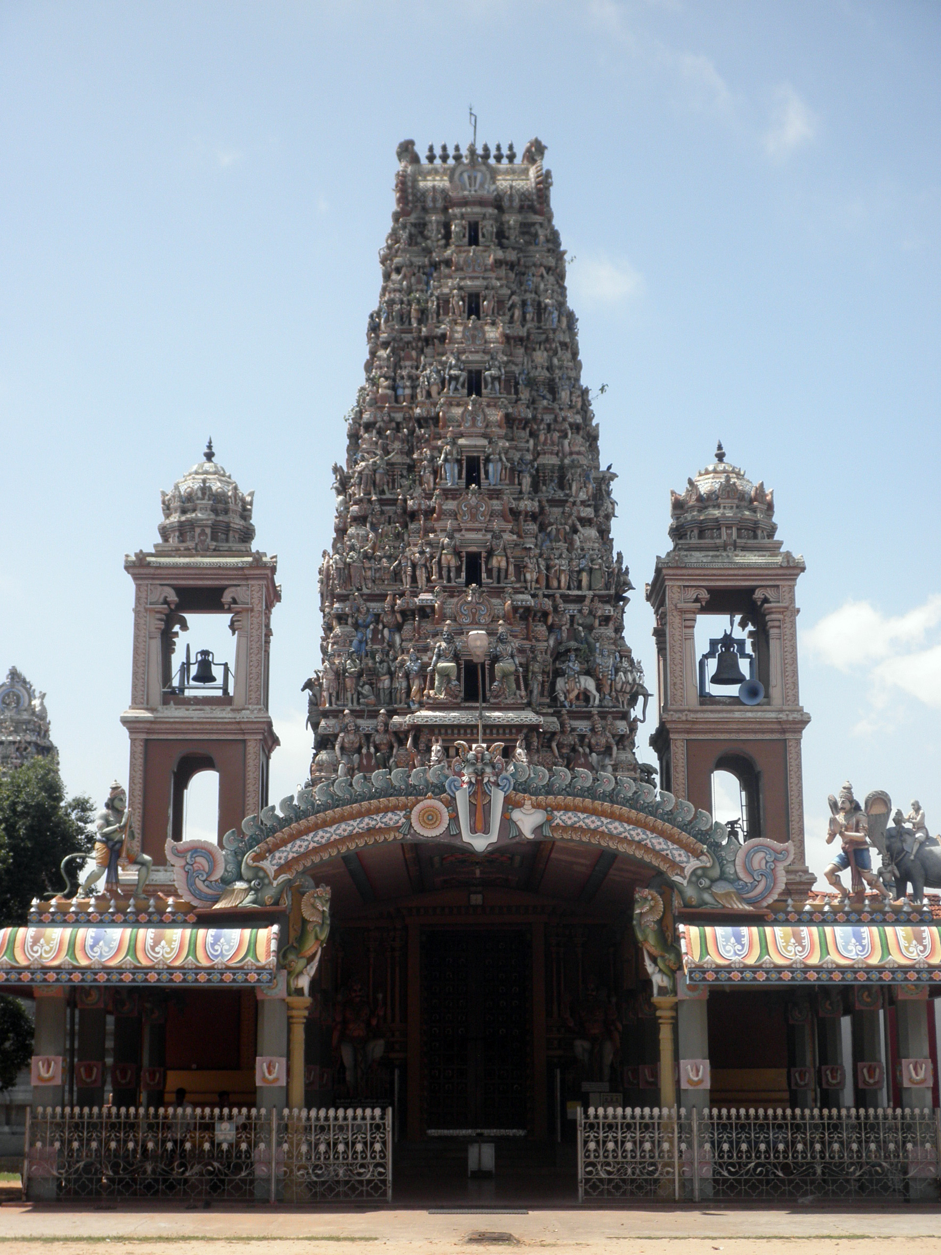 Vatharaja Perumal temple, Jaffna